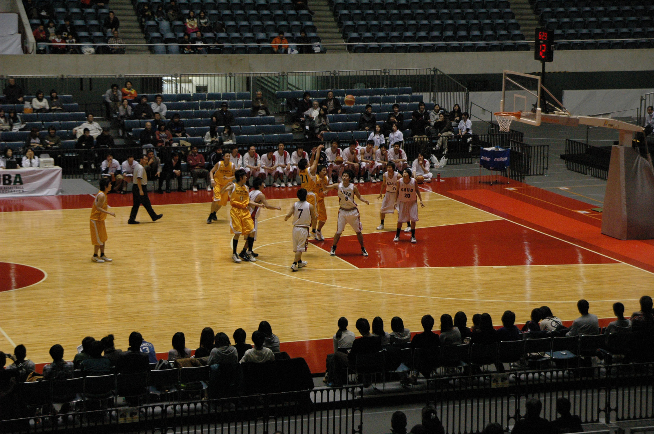 2011年全日本総合バスケットボール選手権大会1回戦、中央大学対宮田自動車。代々木第一体育館で。